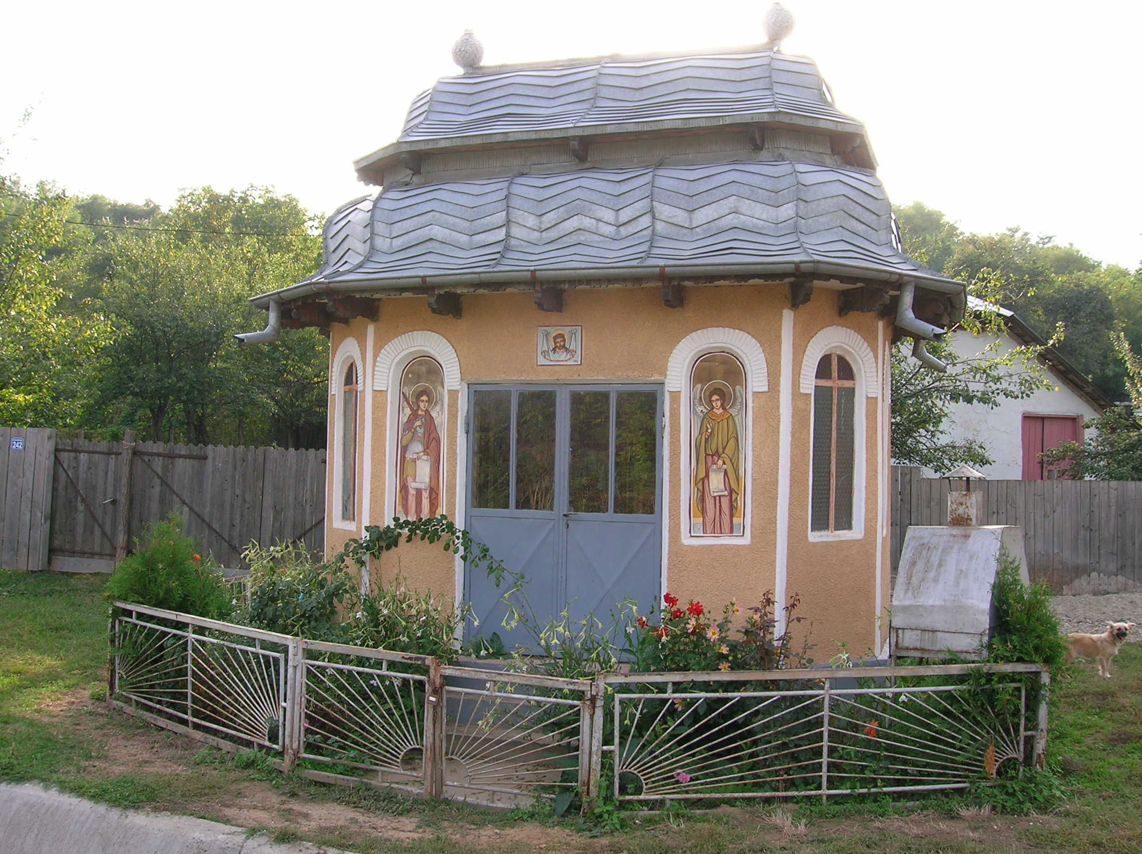 Comuna Valea Seacă Bacău - Satul Cucova - Troiţă de lângă podul care face legătura dintre Cucova şi Satul Valea Seacă